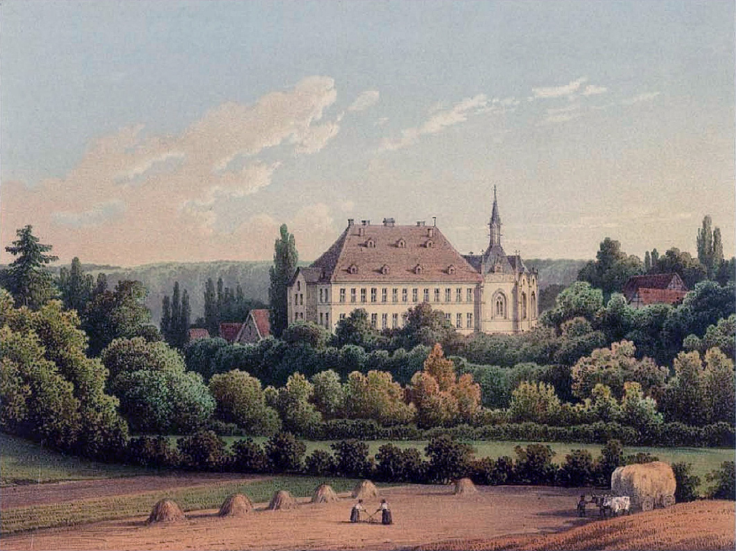 Schloss Wewer, Lithografie aus dem 19. Jahrhundert